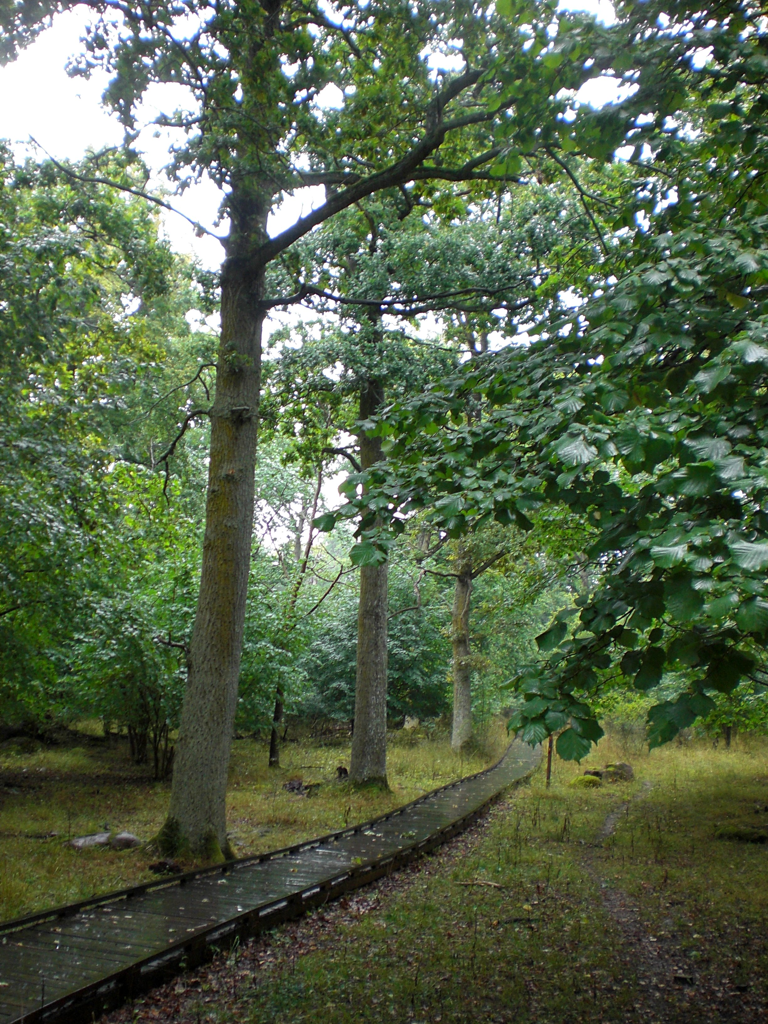 Weg durch Halltorps hage auf Öland Schweden